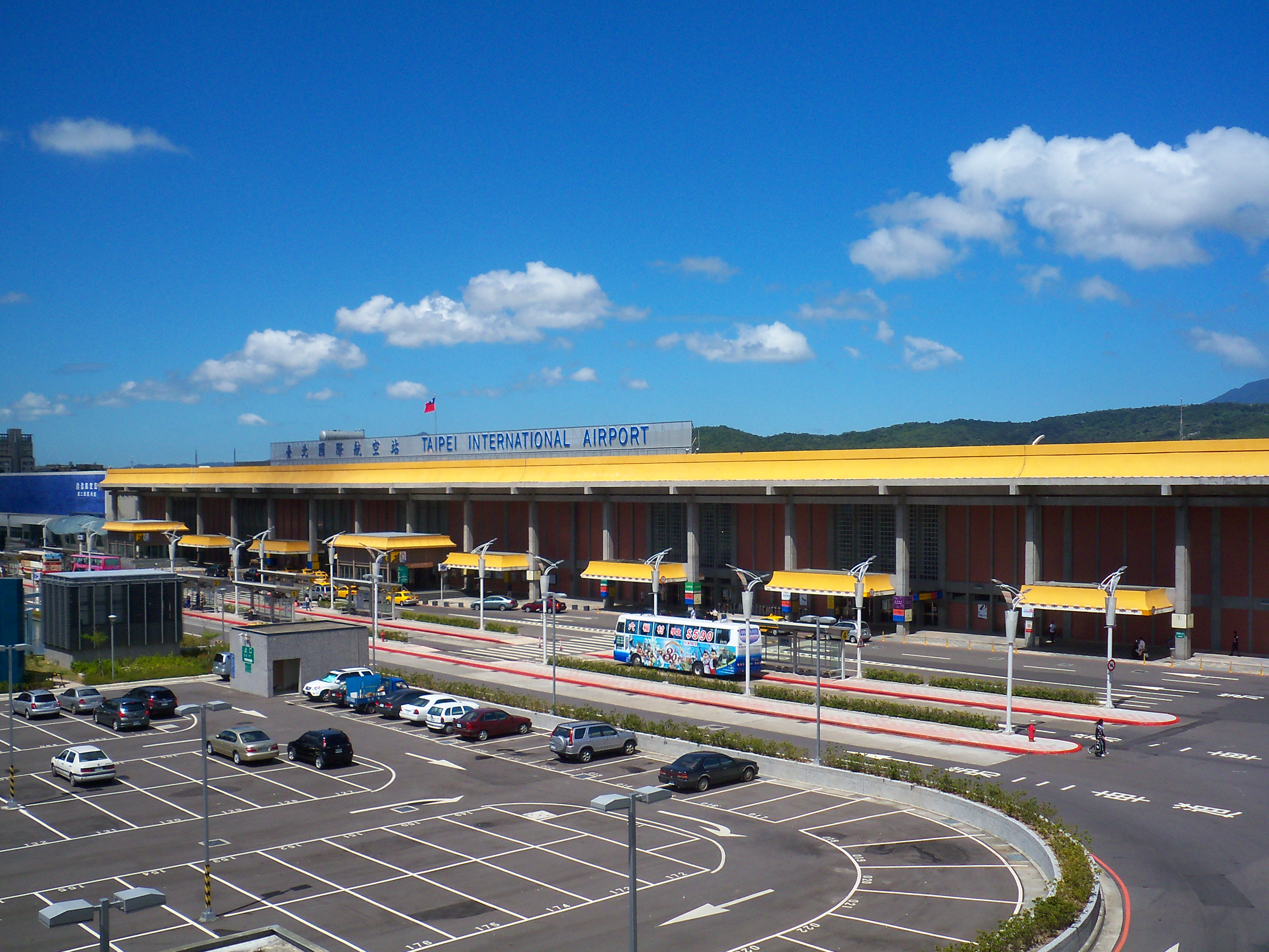 台北松山空港第1ターミナルビル。 Bân-lâm-gú: Tâi-pak Siông-san Ki-tiûnn tē-1 hâng-hā.